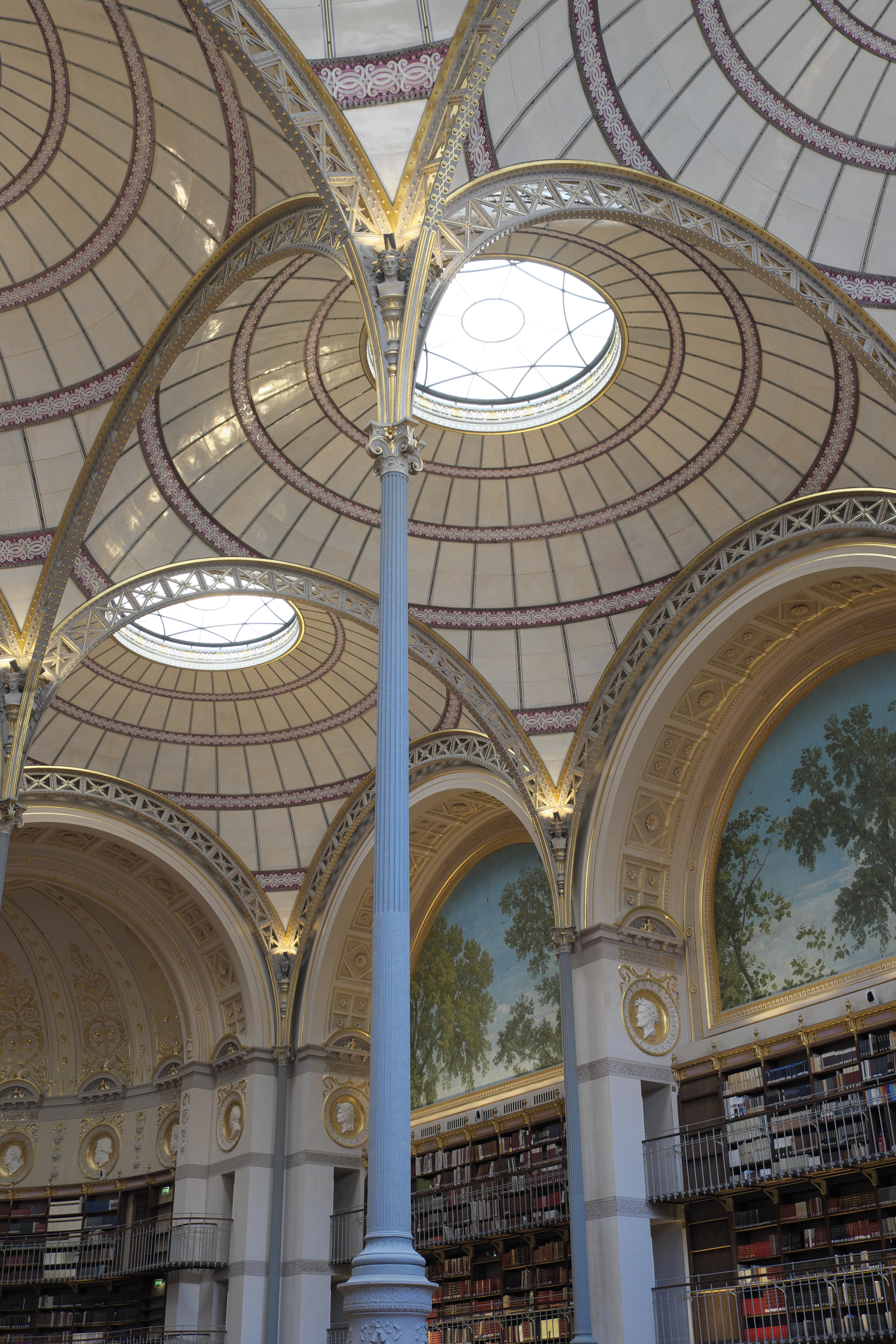 Lesesaal, Salle Labrouste, der Bibliothèque nationale de France, Site Richelieu-Louvois im 2. Arrondissement von Paris